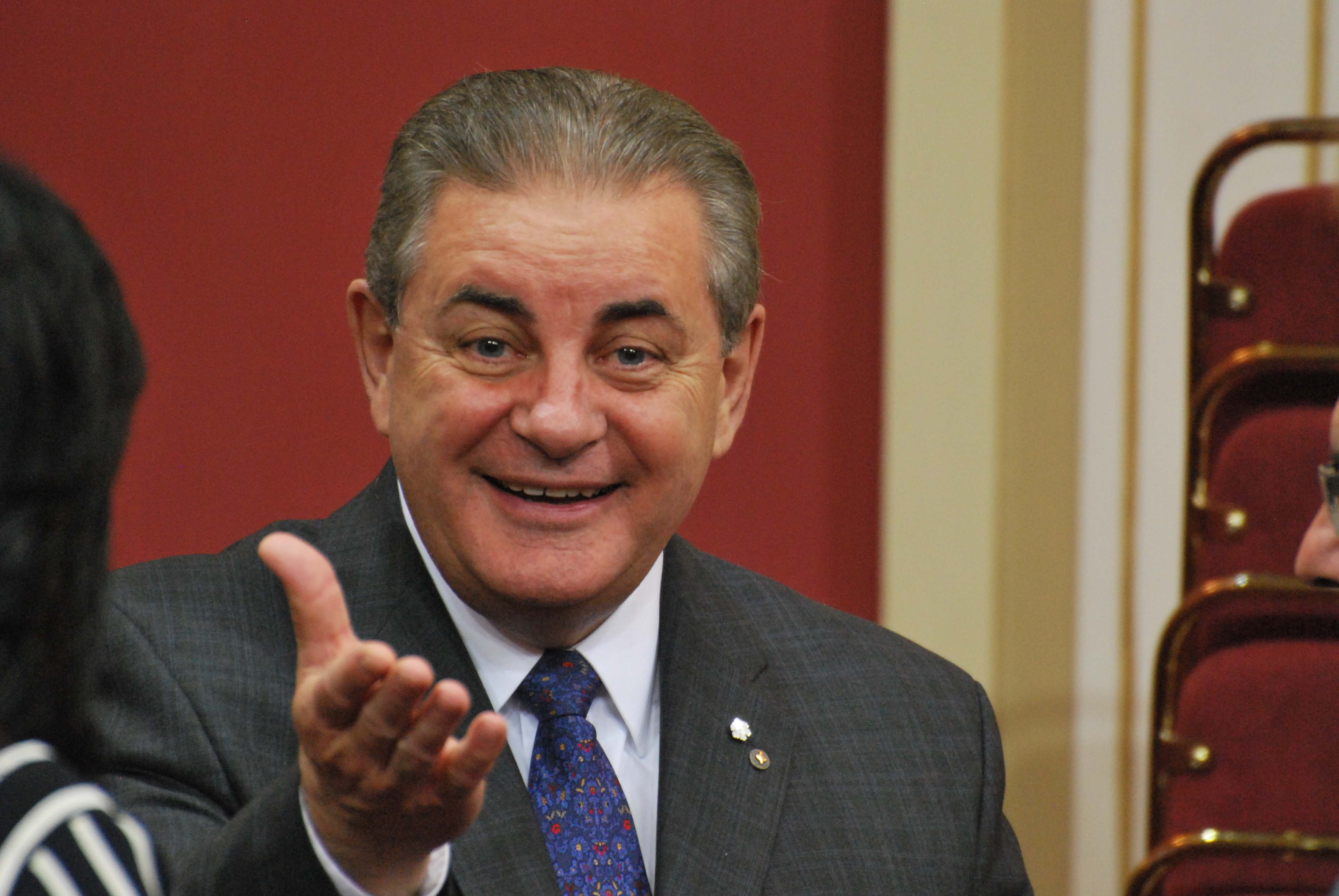 Cérémonie de remise de l'ordre national du Québec 2013. Jacques Duchesneau